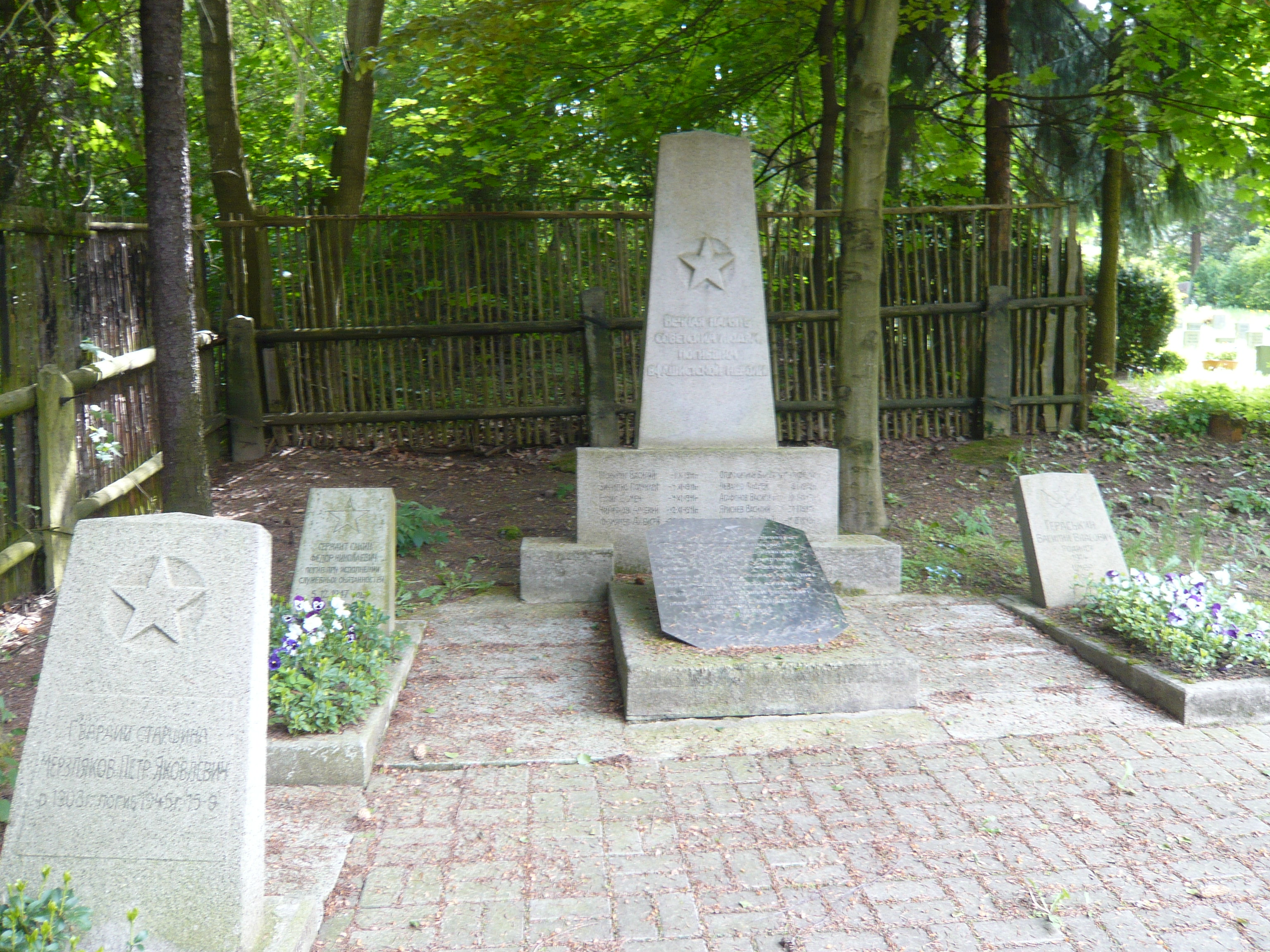 Stadt Aue, Ehrenmale auf dem St. Nikolai-Friedhof